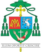 Wappen Franz Lackners als Weihbischof der Diözese Graz-Seckau